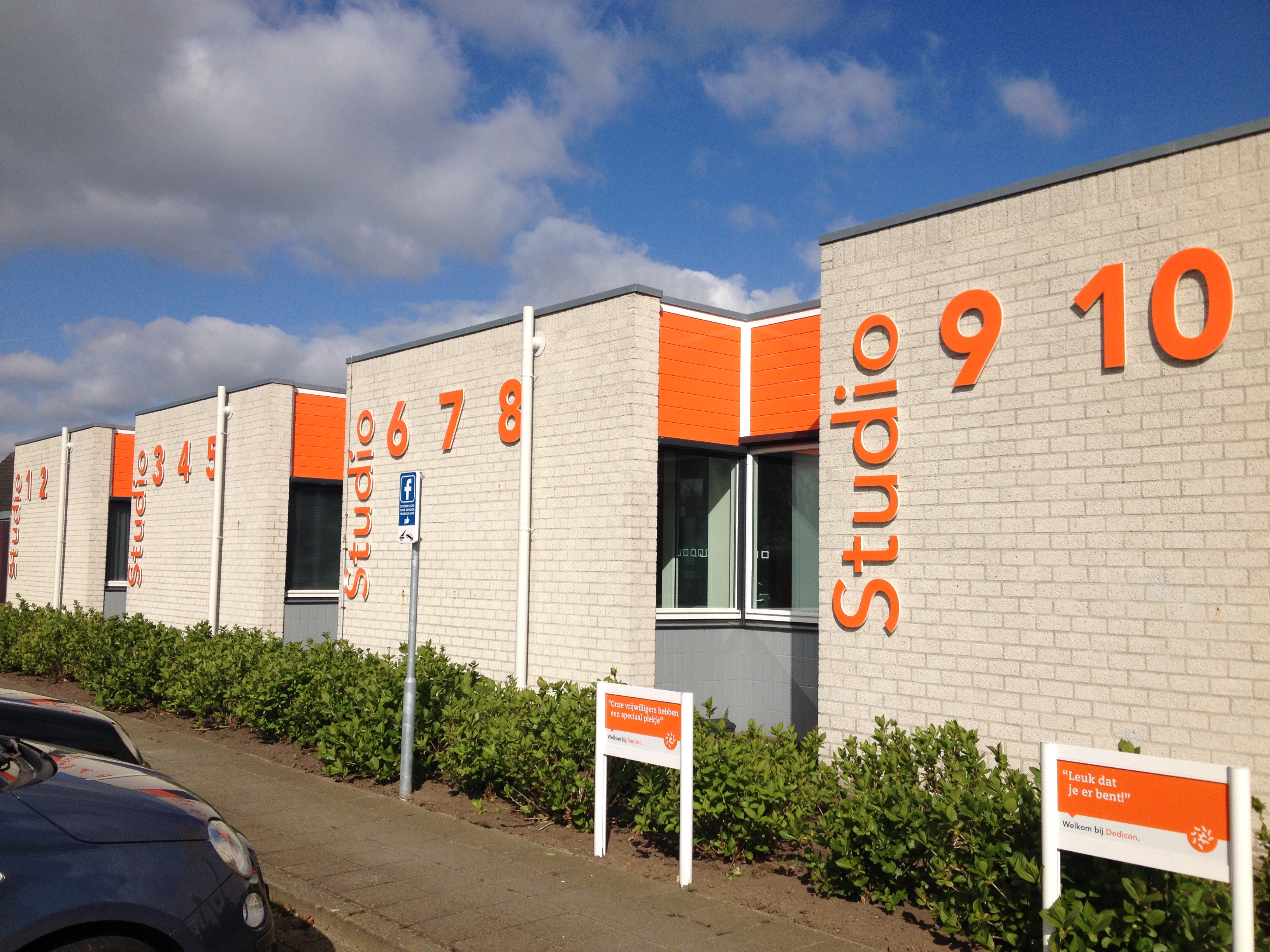 Buitenaanzicht van de studio's van Dedicon in Grave